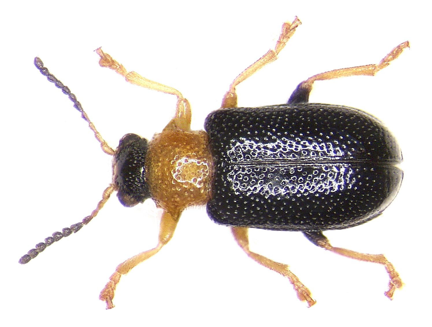 Zeugophora flavicollis (Marsham, 1802) Familie: Chrysomelidae Grösse: 2,5-3,5 mm Verbreitung: Europa Ökologie: an Populus tremula, P.canadensis und Salex caprea Fundort: Germania, Oberfranken, Selbitz leg. det. U.Schmidt, 2000 Foto: U.Schmidt, 2005